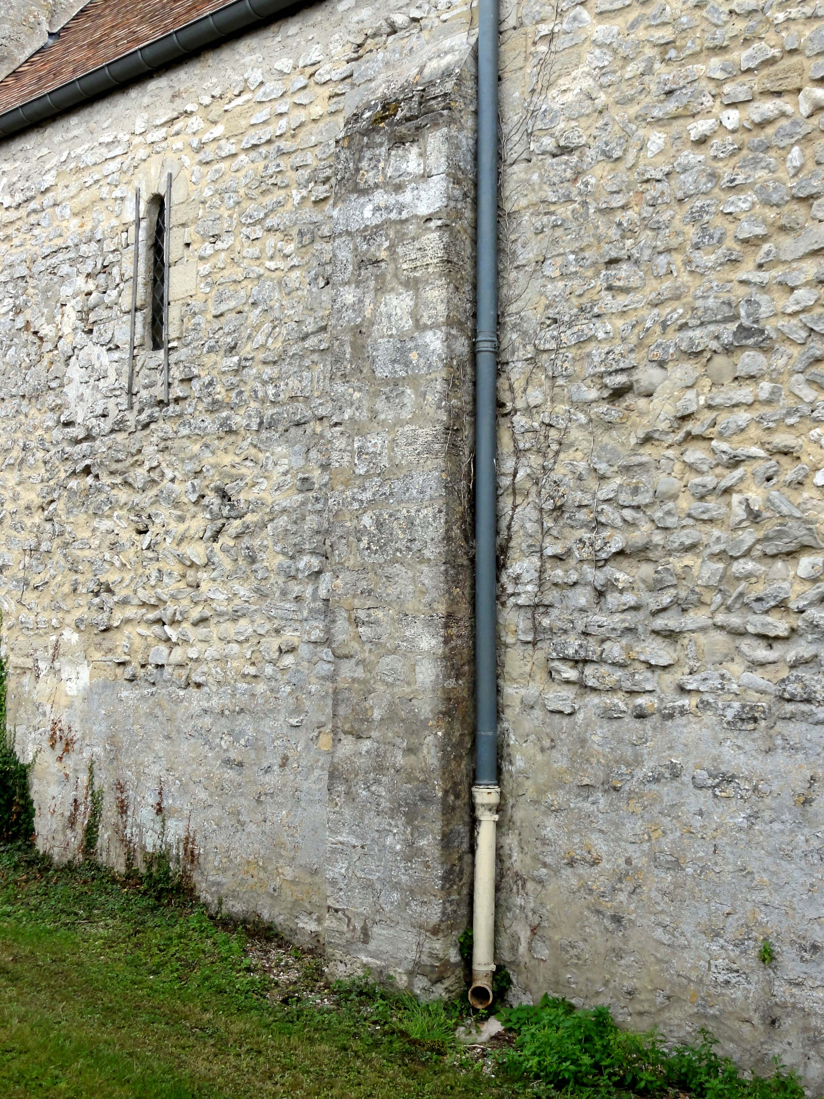 Église Saint-Martin d'Omerville (voir titre).